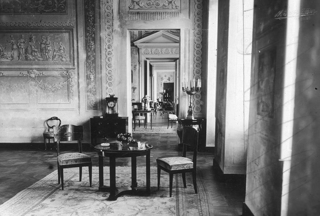 Беларуская (тарашкевіца): Сьвяцак (Śviacak), палац Валовічаў (Vałovič)